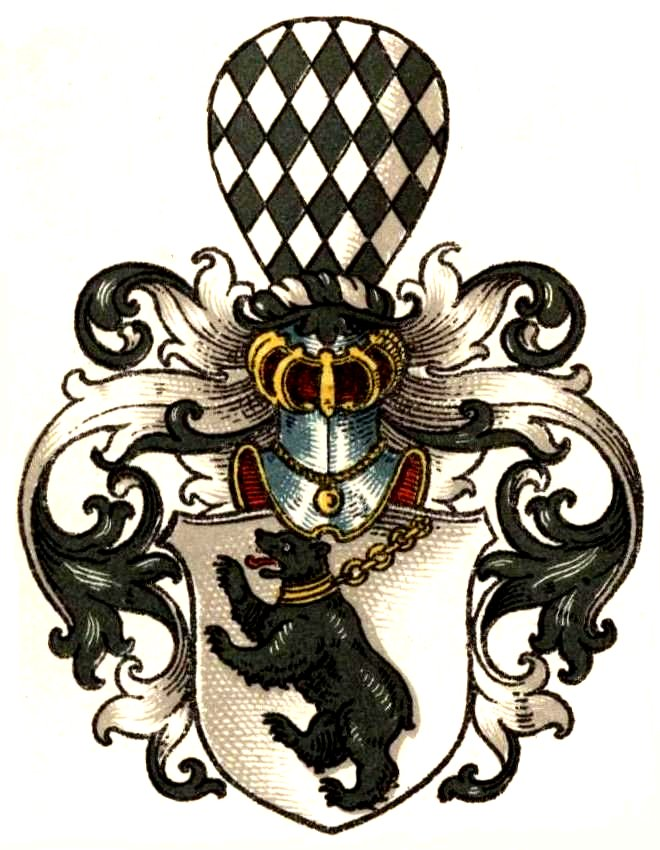 Stamm-Wappen I derer von Bar (Baer)